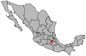 Locator map of Teotihuacán, México, Mexico